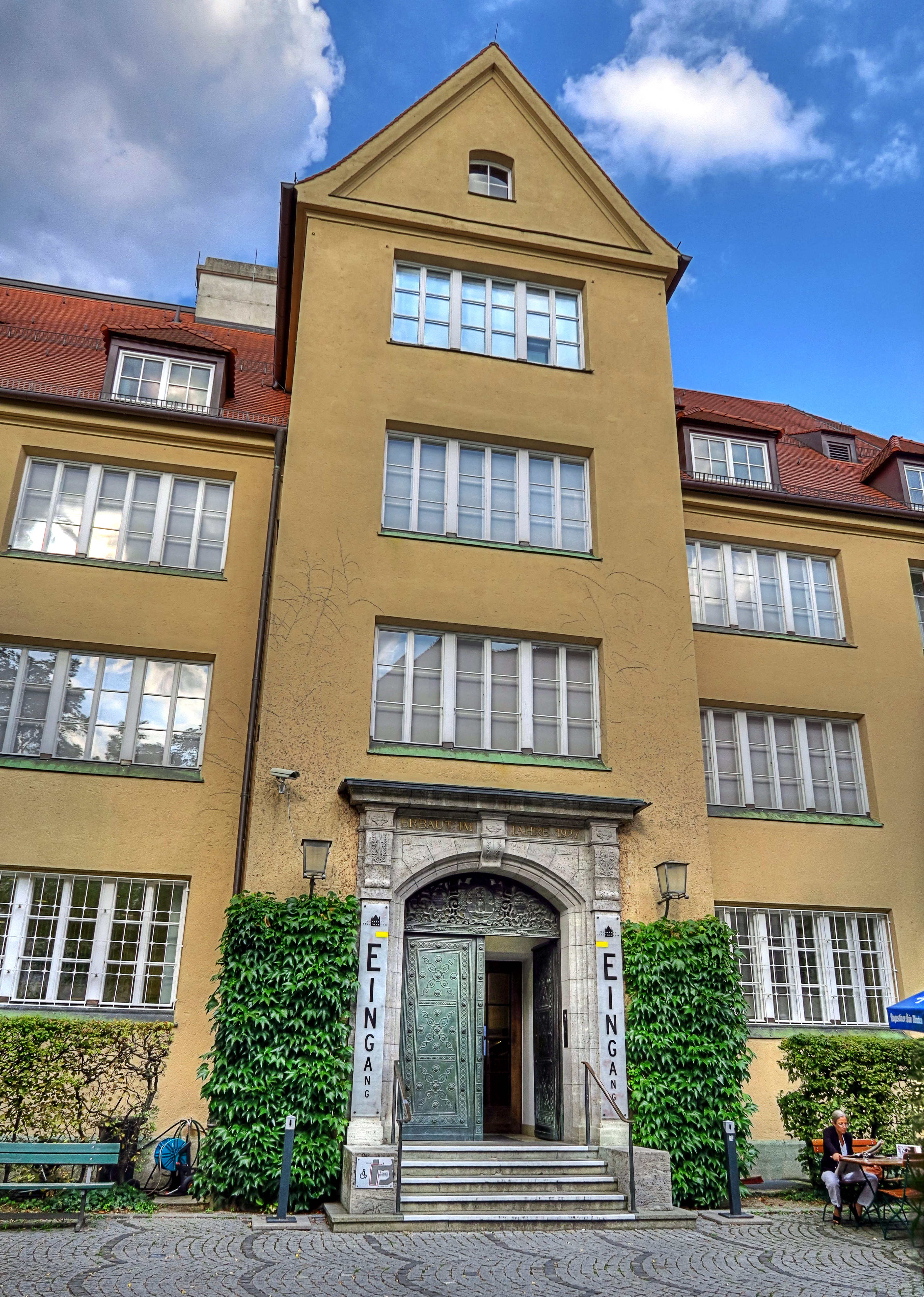 Deutschland, Bayern, Oberbayern, Münchner Stadtmuseum Haupteingang